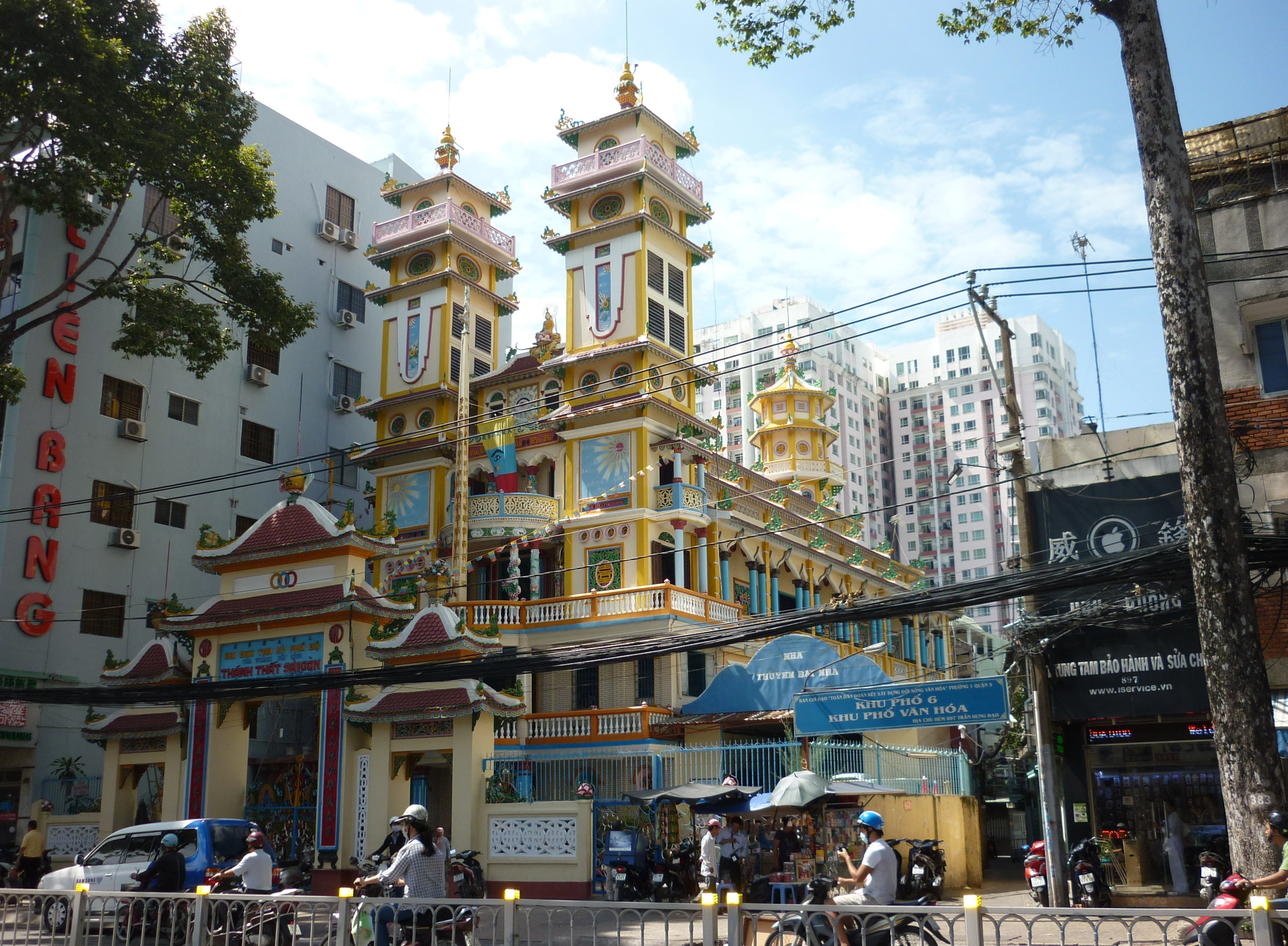 Thánh thất Sài Gòn nhìn từ hướng tây bắc